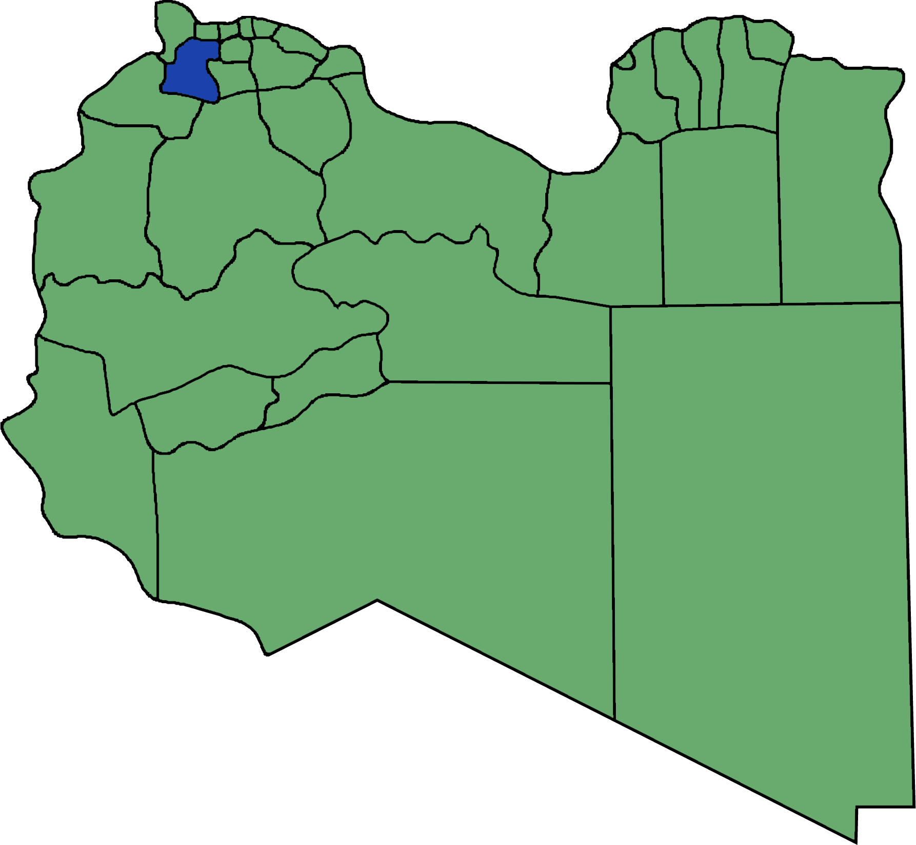 Die neuen Gemeinden (Munizipien) in Libyen. Yafran hervorgehoben.